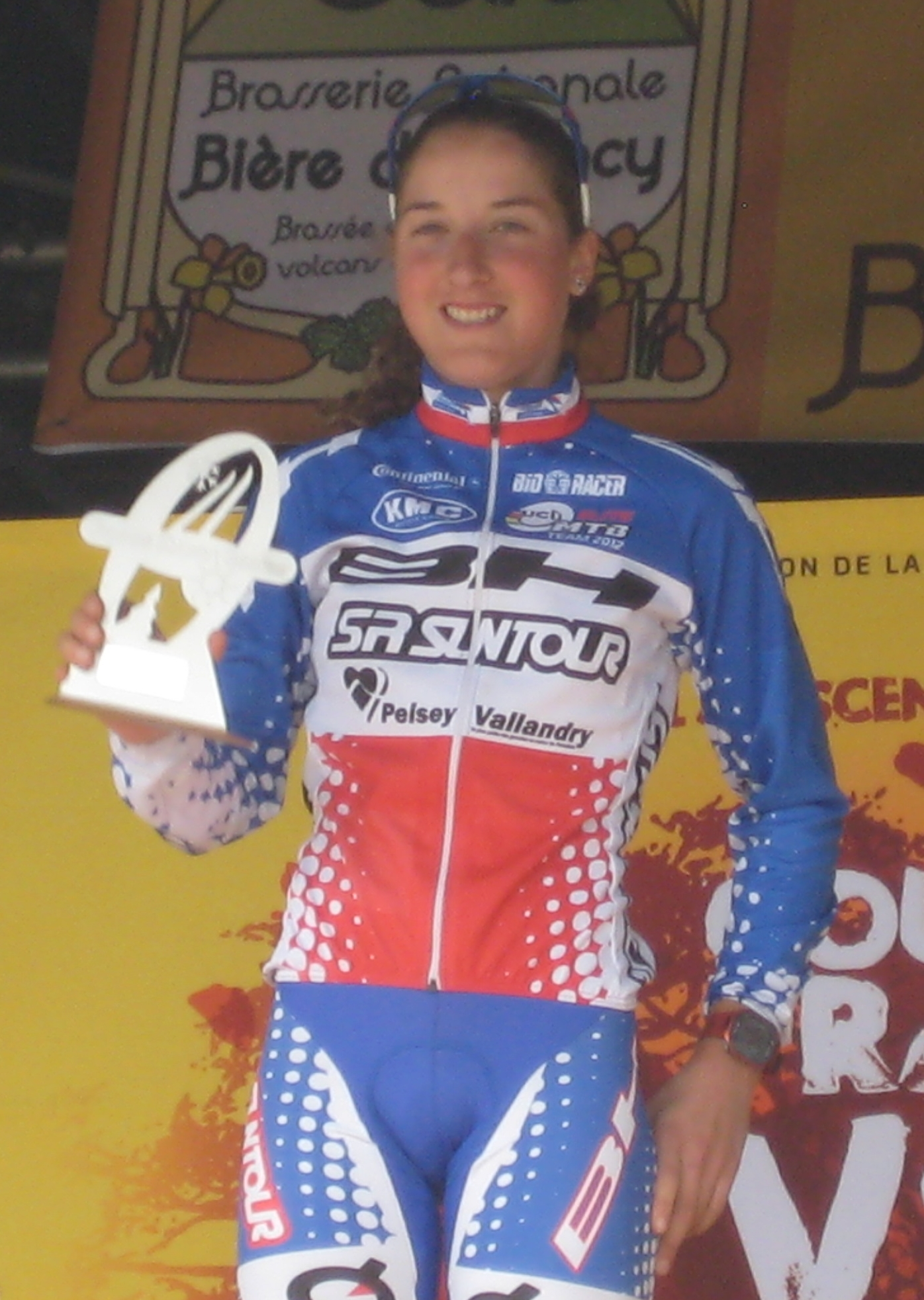 Julie Bresset sur le podium dames de la Coupe de France de VTT 2012 à Super-Besse